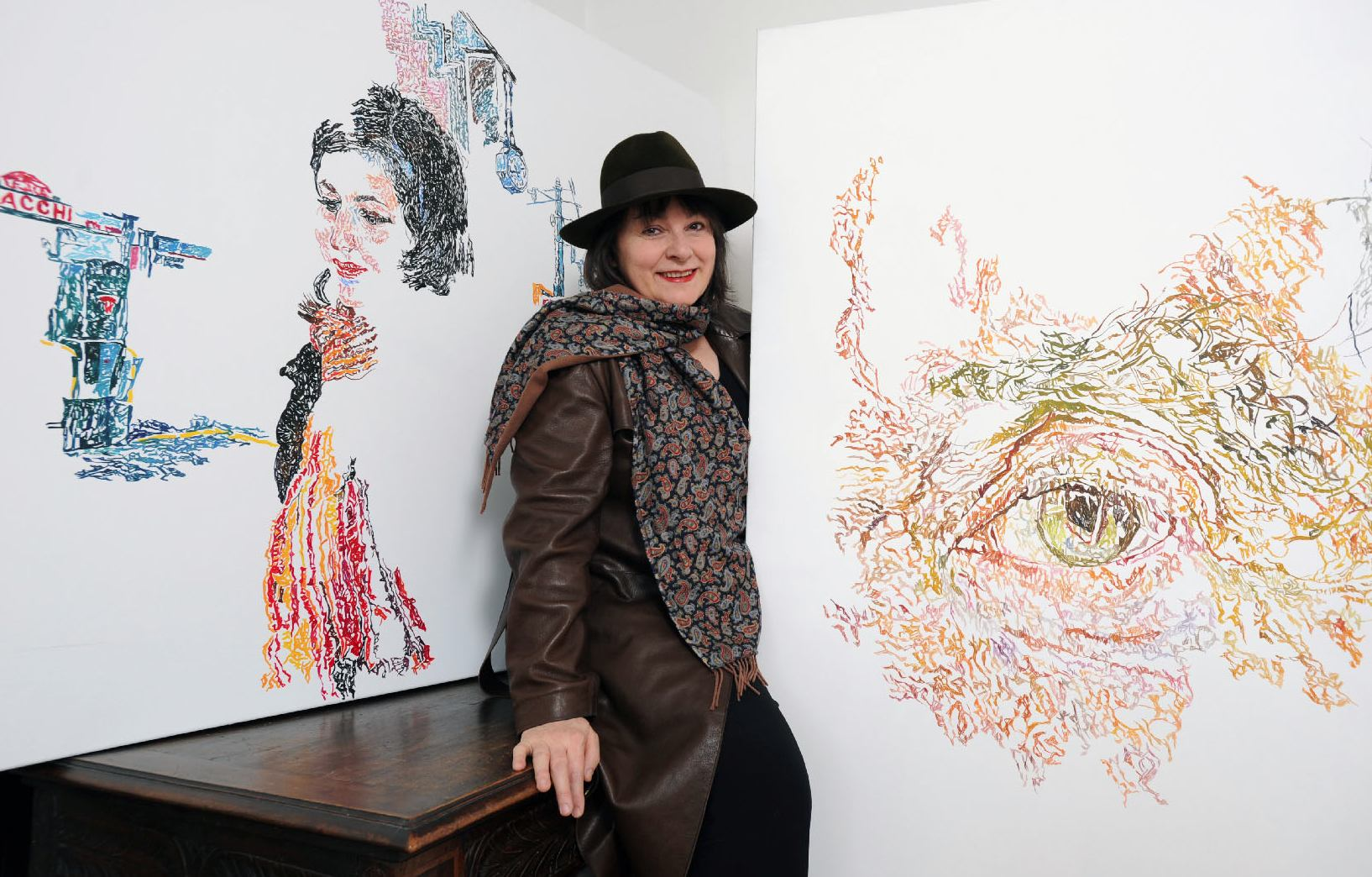 carte de visite